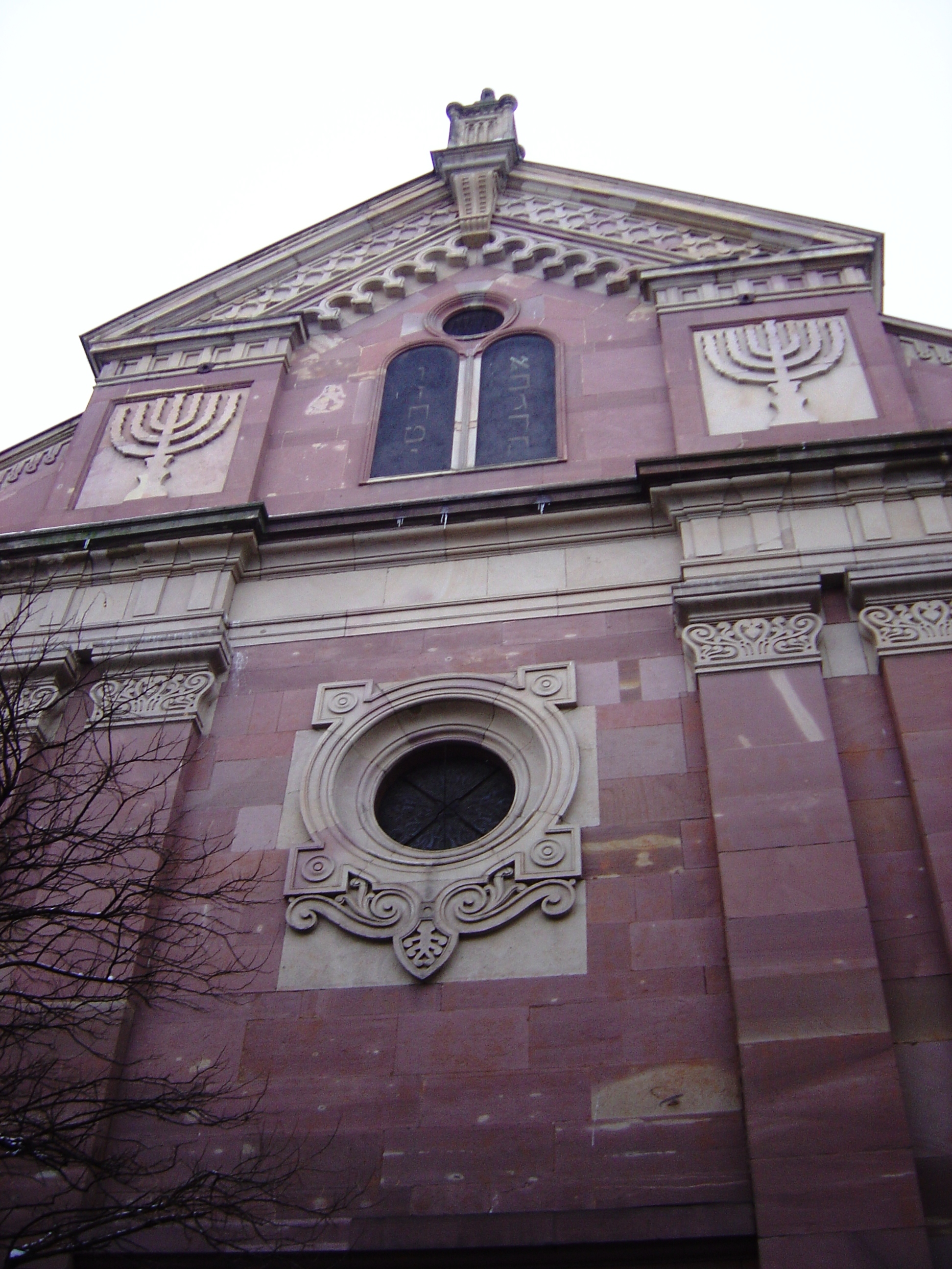 Chevet de la synagogue de Mulhouse (1849), photographié en 2006.